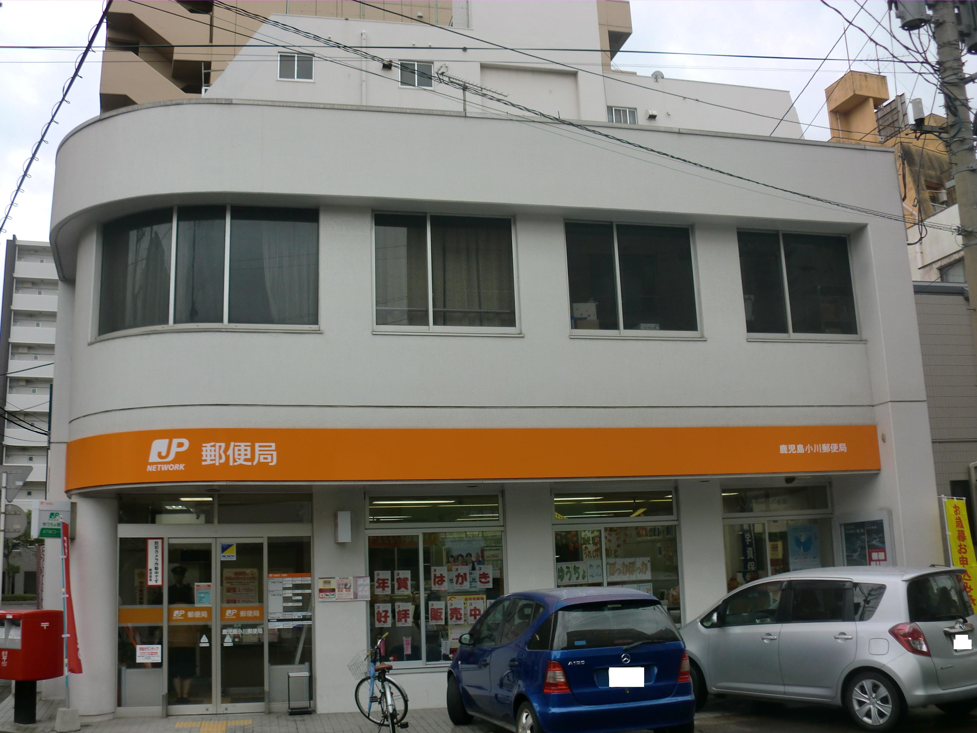 鹿児島市にある鹿児島小川（かごしまおがわ）郵便局